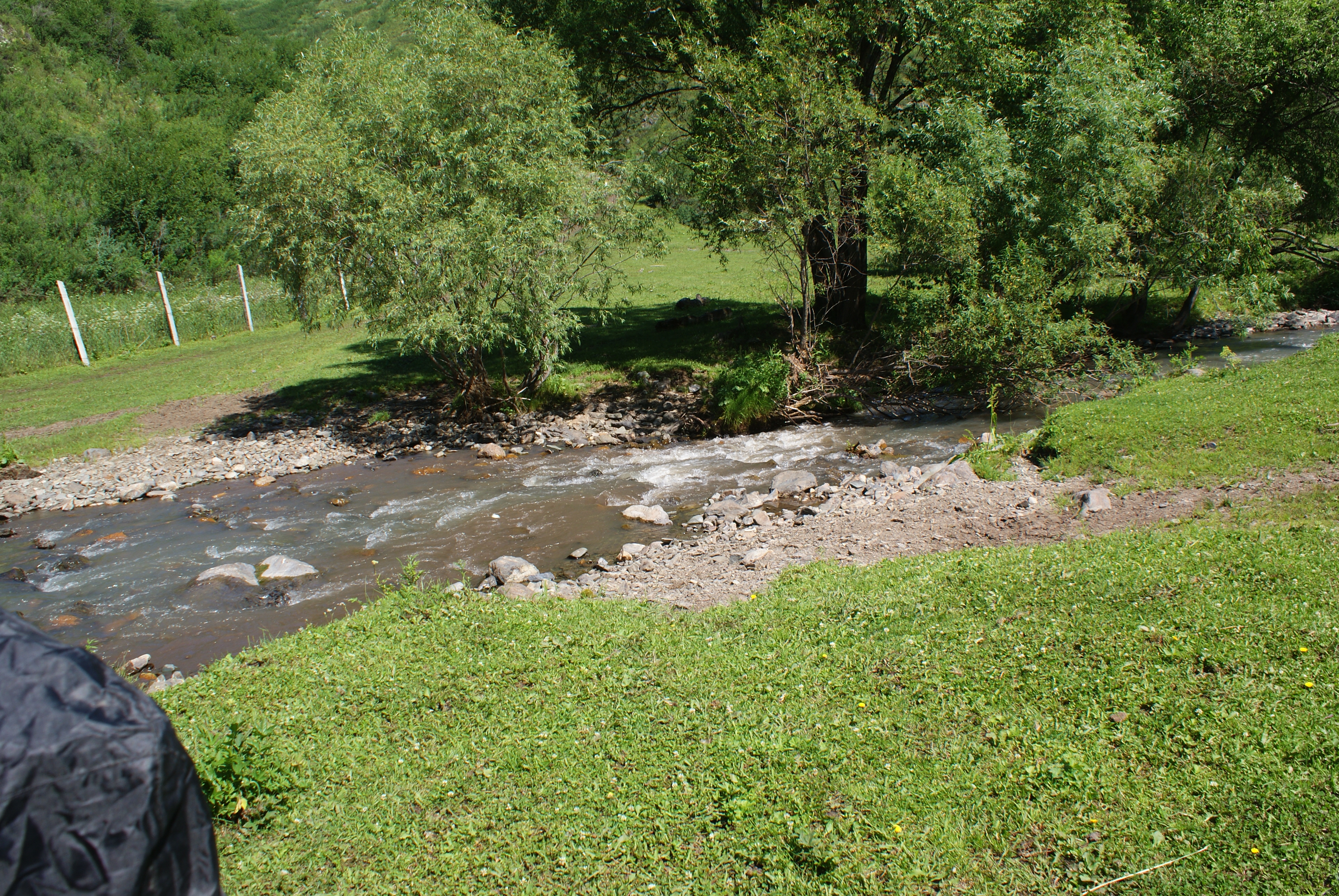 Брод р.Малая Татарка